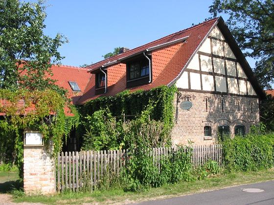 Landhotel Fontane, Gröben, Brandenburg - Benannt nach der Frau von Theodor Fontane, Theodore F. (also nur +"e" im Vornamen.